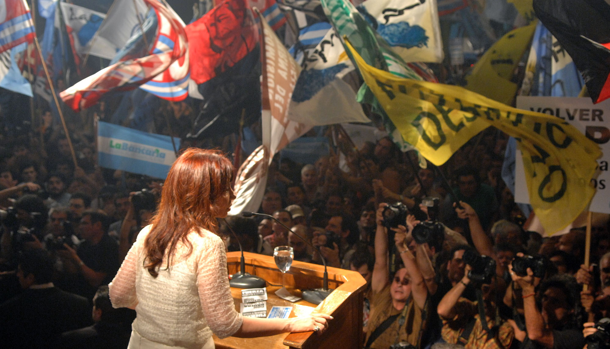 La presidenta de Argentina, Cristina Fernández dando su discurso en el acto de Parque Norte, el 31 de marzo de 2008.